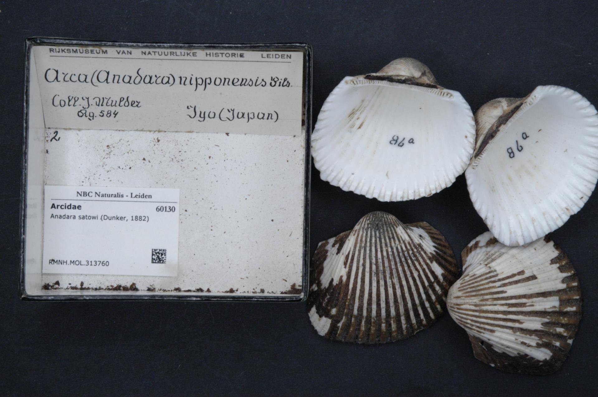 Anadara satowi (Dunker, 1882)